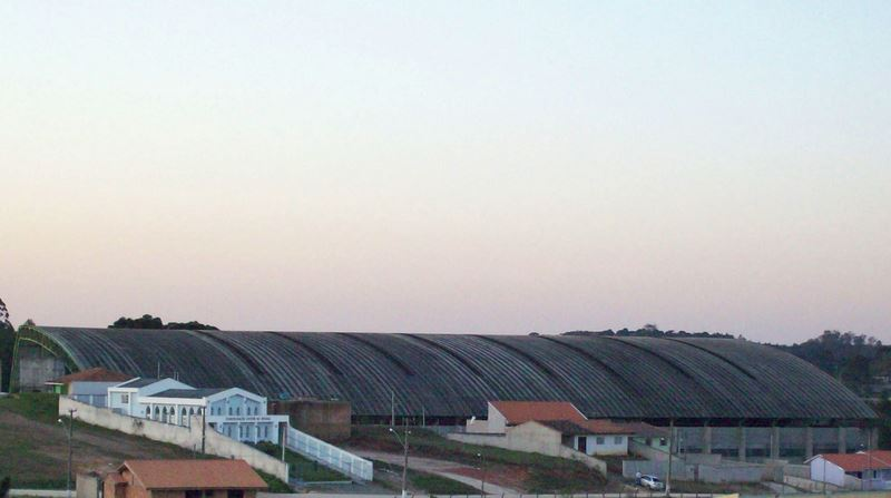 Vista da maior arena coberta da América Latina, situada em Campina Grande do Sul, região metropolitana de Curitiba, PR, Sul do Brasil.